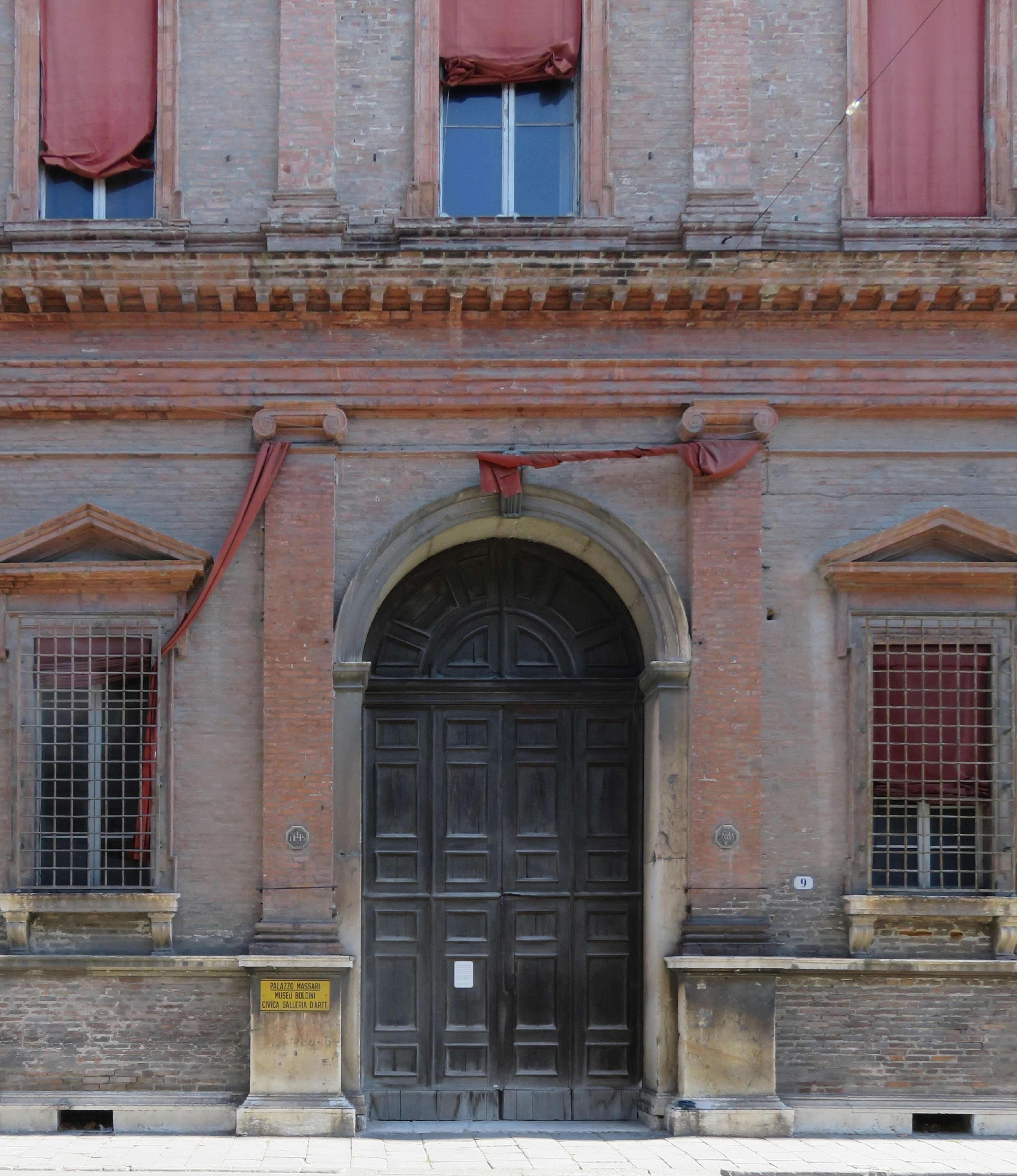 Portone di principale di Palazzo Massari, Ferrara